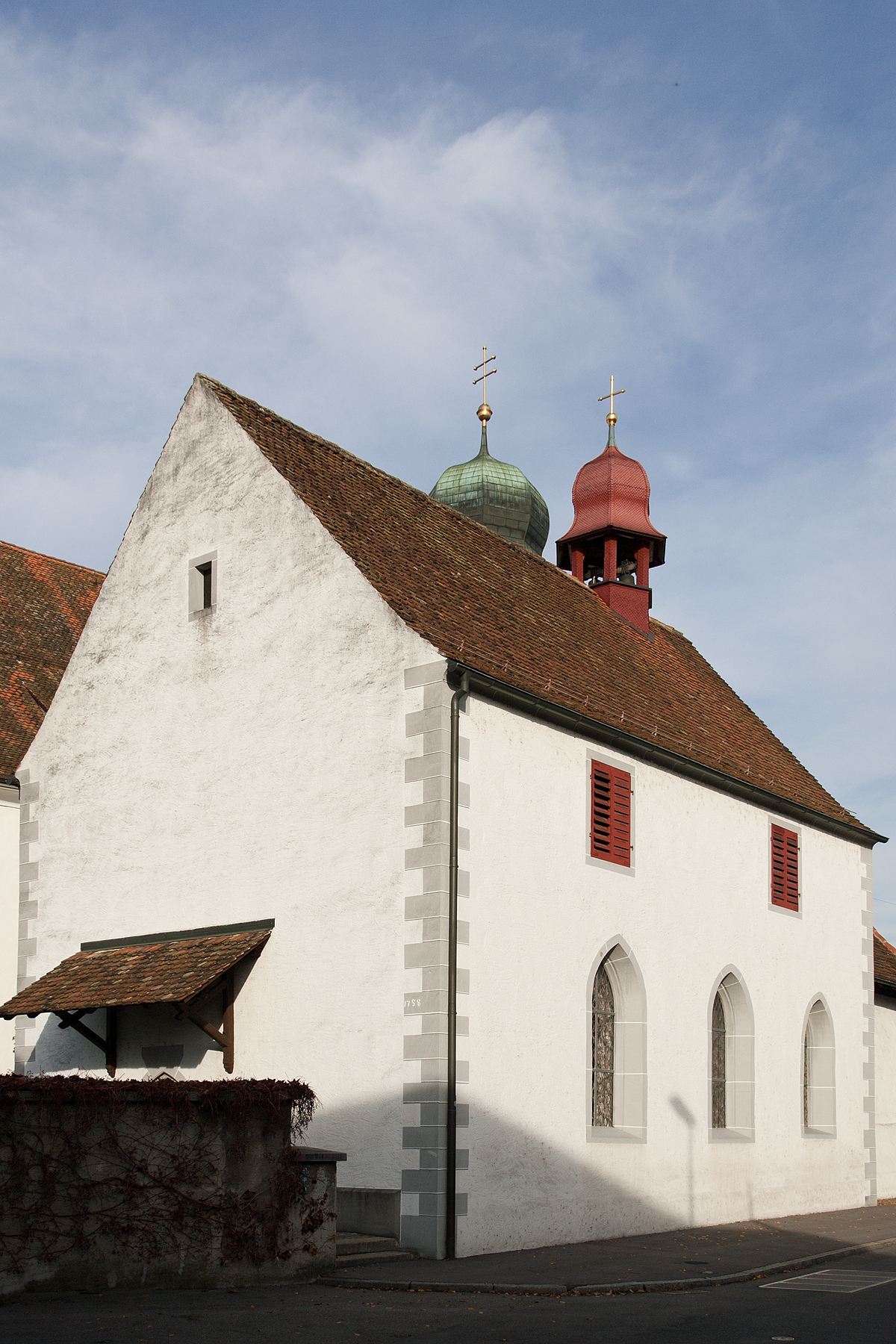 Beinhaus St. Anna neben der Katholischen Kirche St. Martin in Baar (ZG)